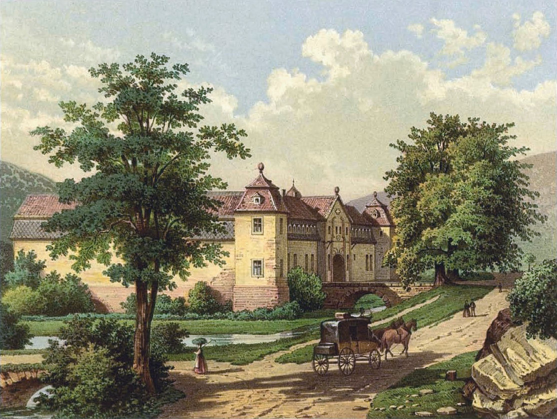 Schloss Ahrenthal, Kreis Ahrweiler, Rheinprovinz